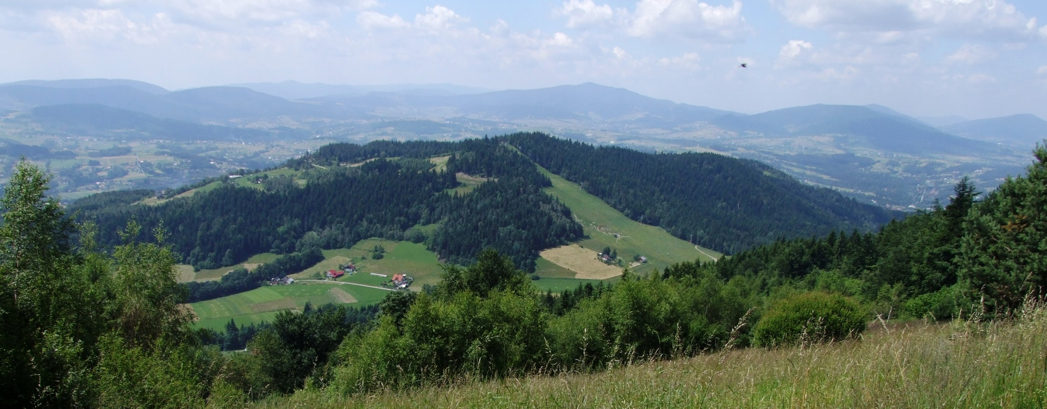 Polana Stoły na Sałaszu Zachodnim i widok na południową stronę (w dole widoczna Łysa Góra, w oddali inne wzniesienia Beskidu Wyspowego) - przycięta